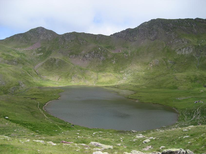 El ibón de Escalar en verano